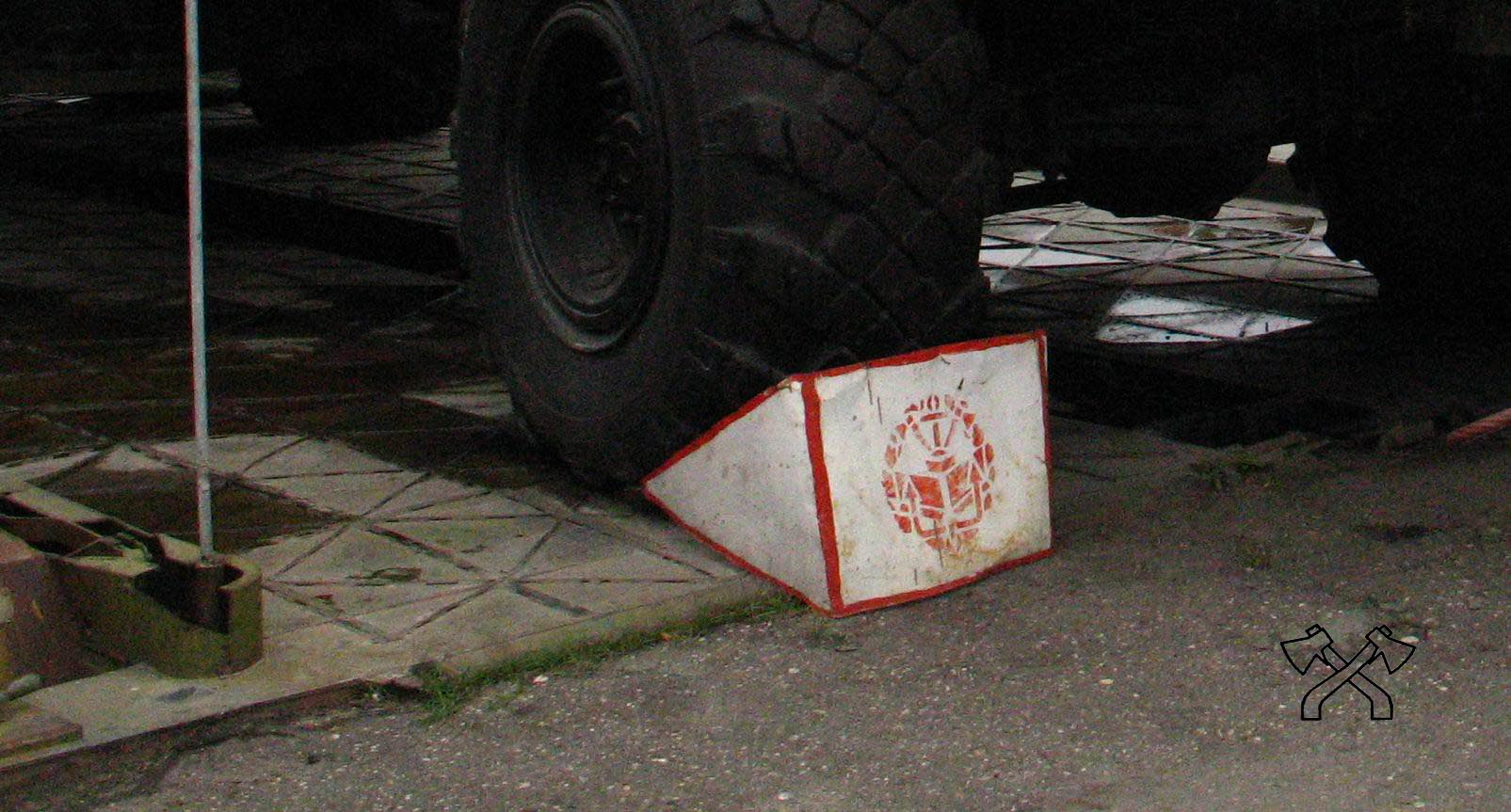 Пролет